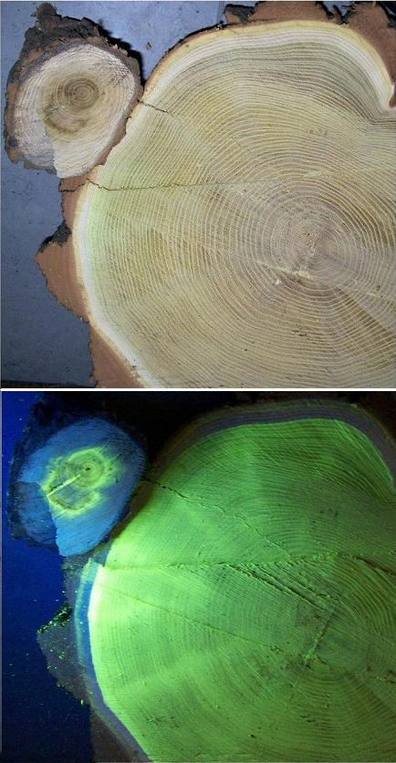 Das Kernholz der Robinie fluoresziert unter ultraviolettem Licht, der Grund dafür sind die eingelagerten Flavonoide, die auch die hohe natürliche Dauerhaftigkeit des Robinienholzes verursachen.